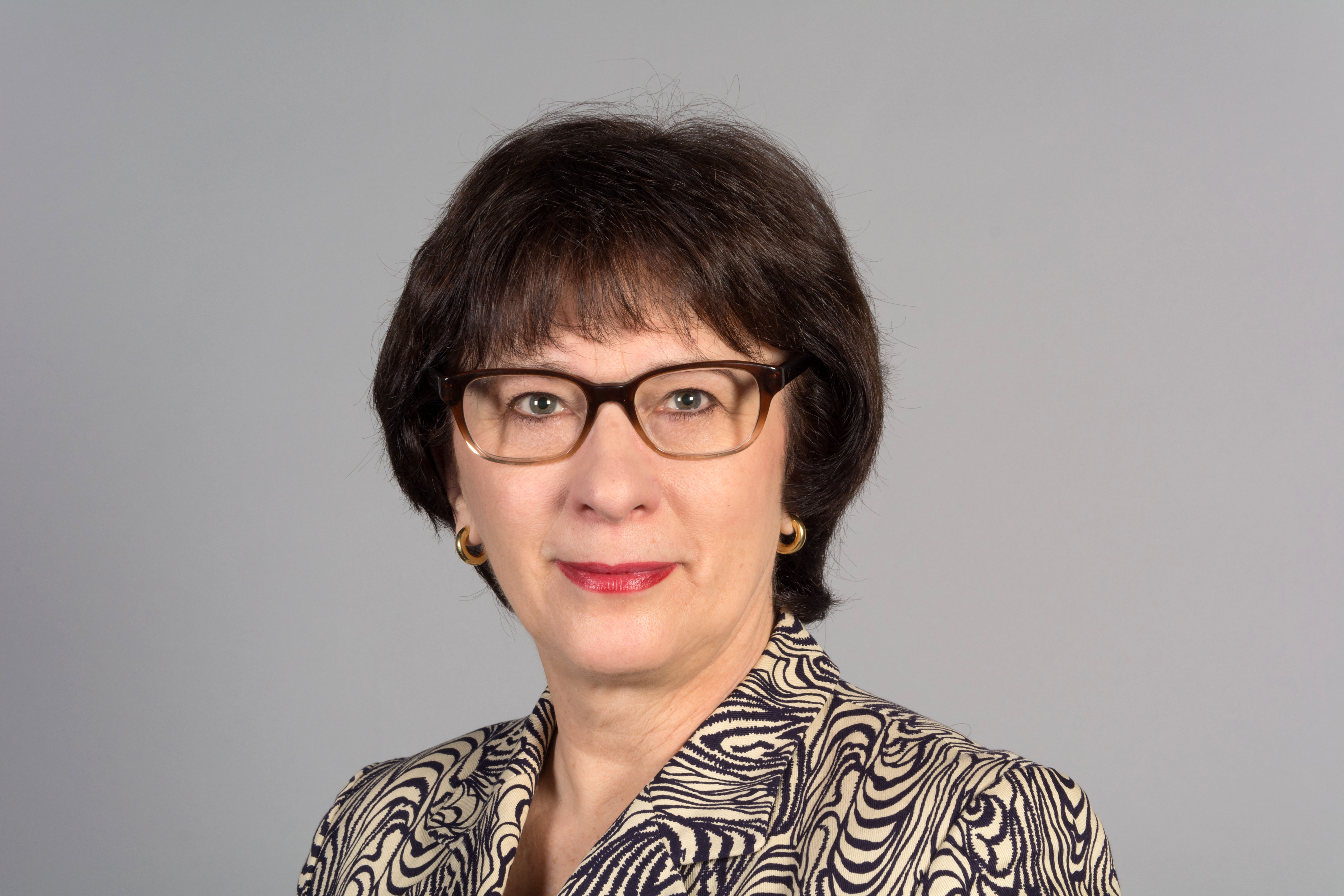 Kalniete Sandra, Lettland, 2014 Mitglied des Europäischen Parlaments (MEP)